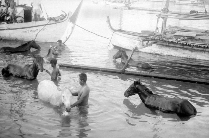 Repronegatief. Mandarse sadopaarden worden gewassen bij Mandarse prauwen (lètè en pakoer)